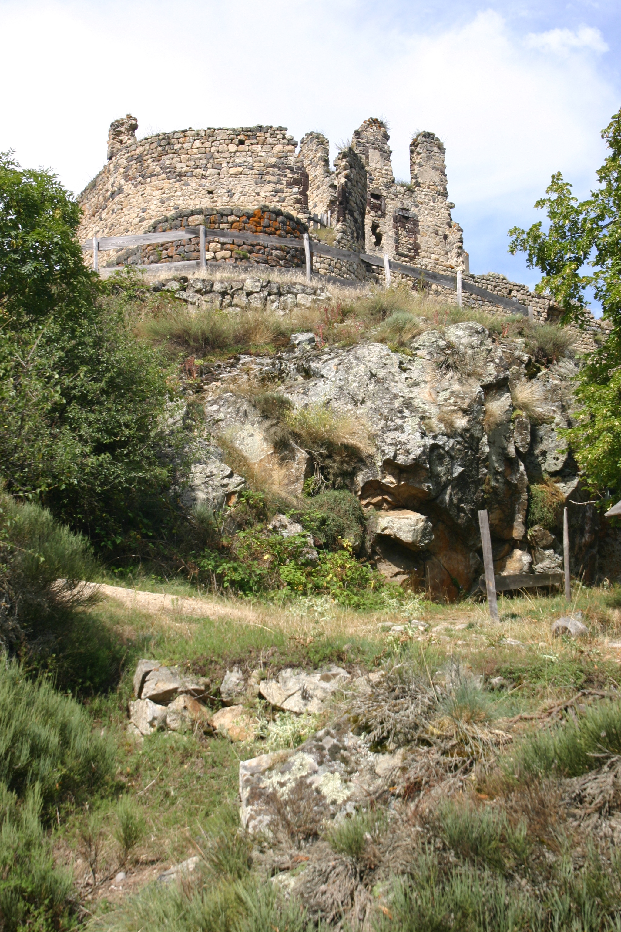 Château de Beaufort (Goudet - Haute-Loire) .